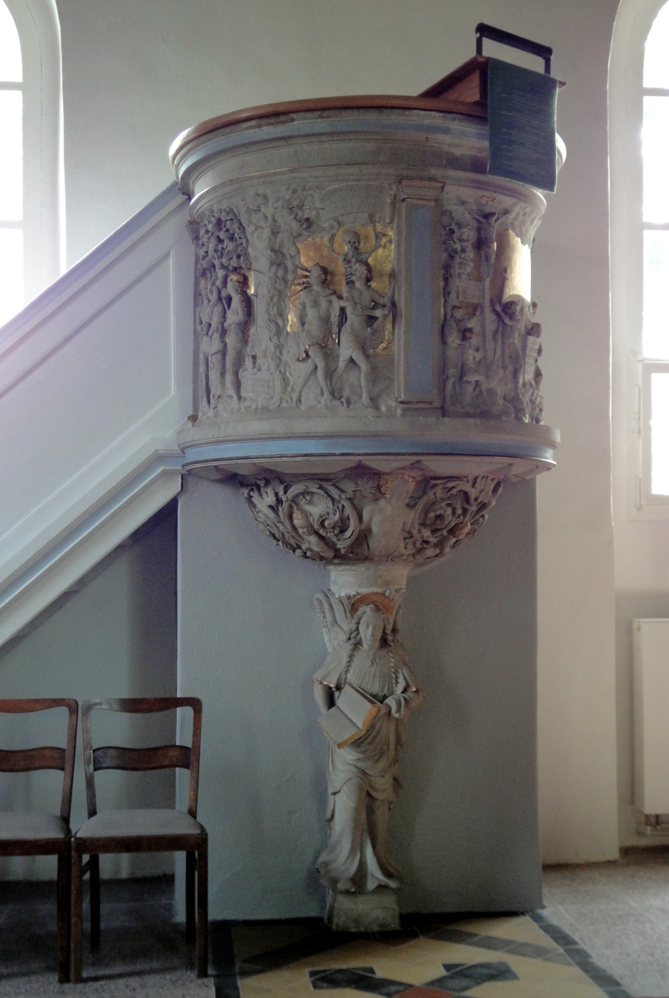 Frontalansicht der Kanzel, Kreuzkirche Bischofswerda